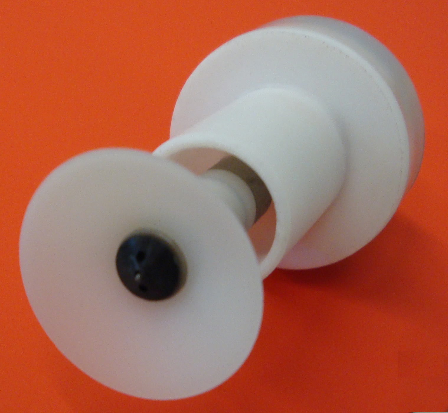 Pralltellerdüse für die Applikation von Pulverlacken